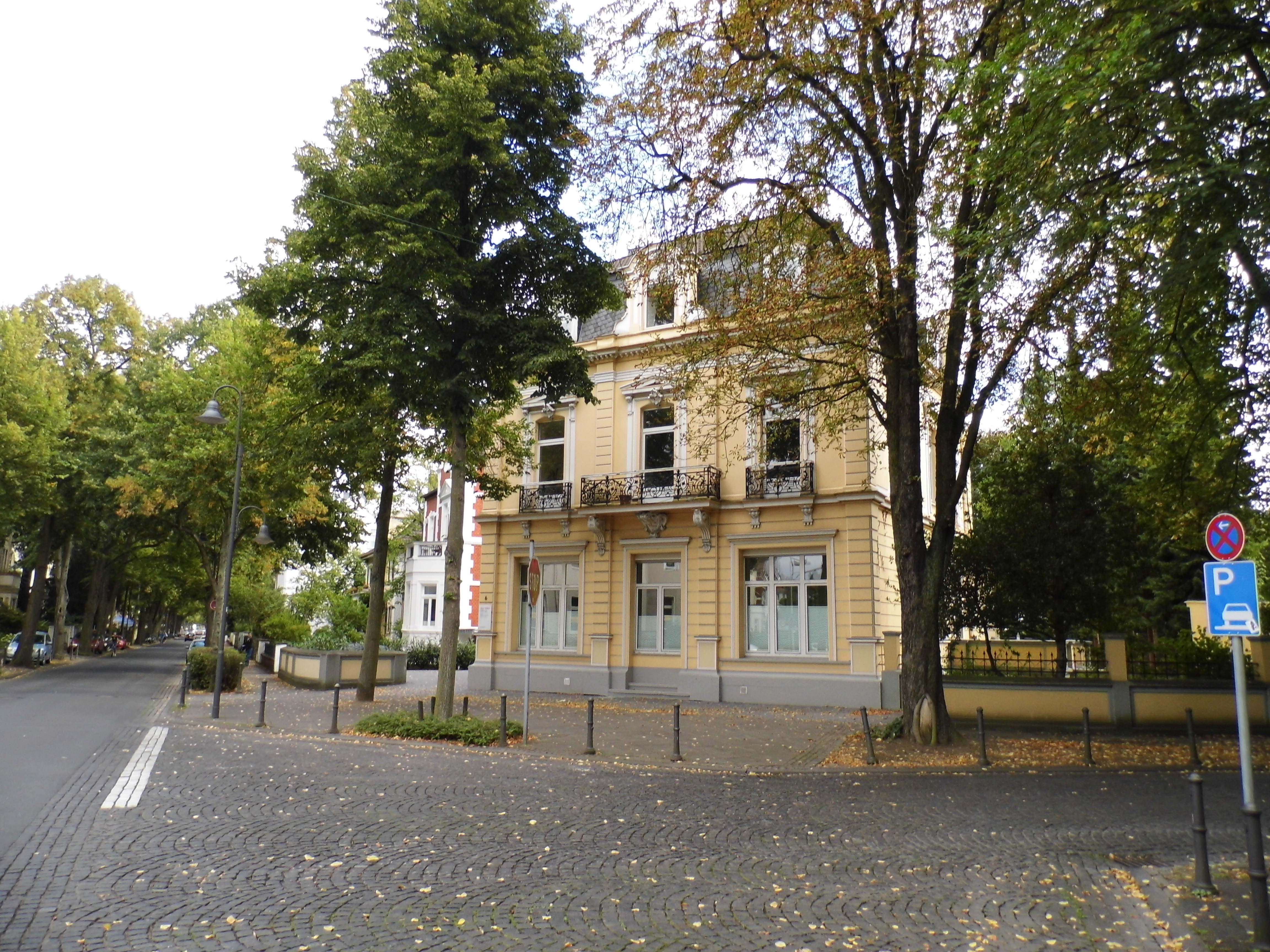 Denkmalgeschützte Villa Rheinallee 6 (Ecke Königsplatz) in Bad Godesberg, Ortsteil Godesberg-Villenviertel